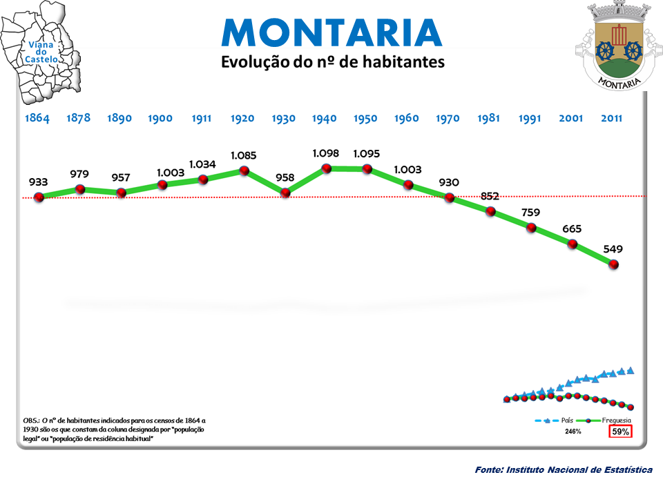 Censos 1864/2011